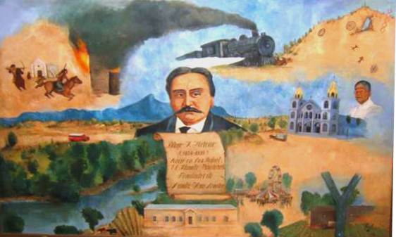 MURAL EN AYUNTAMIENTO DE SANTA ANA SONORA, MEXICO.